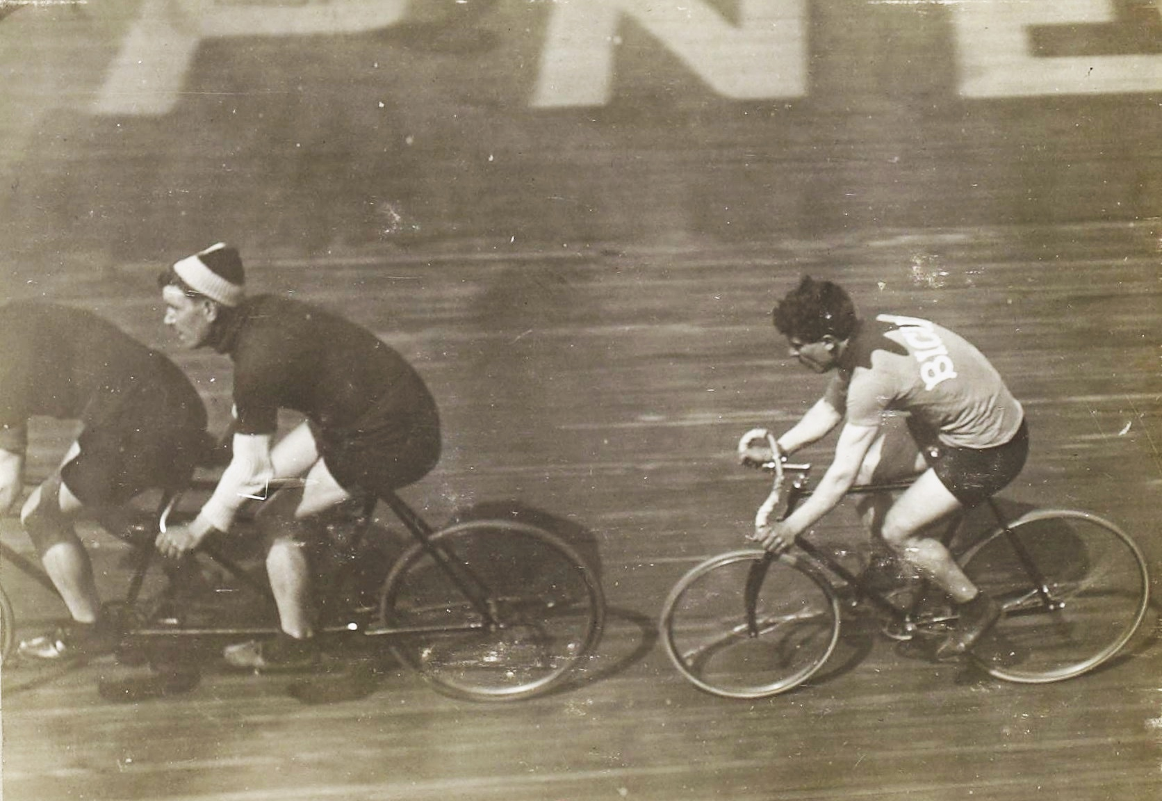 [Collection Jules Beau. Photographie sportive] : T. 35. Années 1908, 1909 et 1910 / Jules Beau